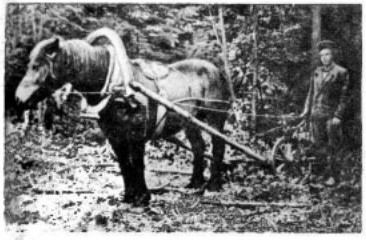 вывозка леса